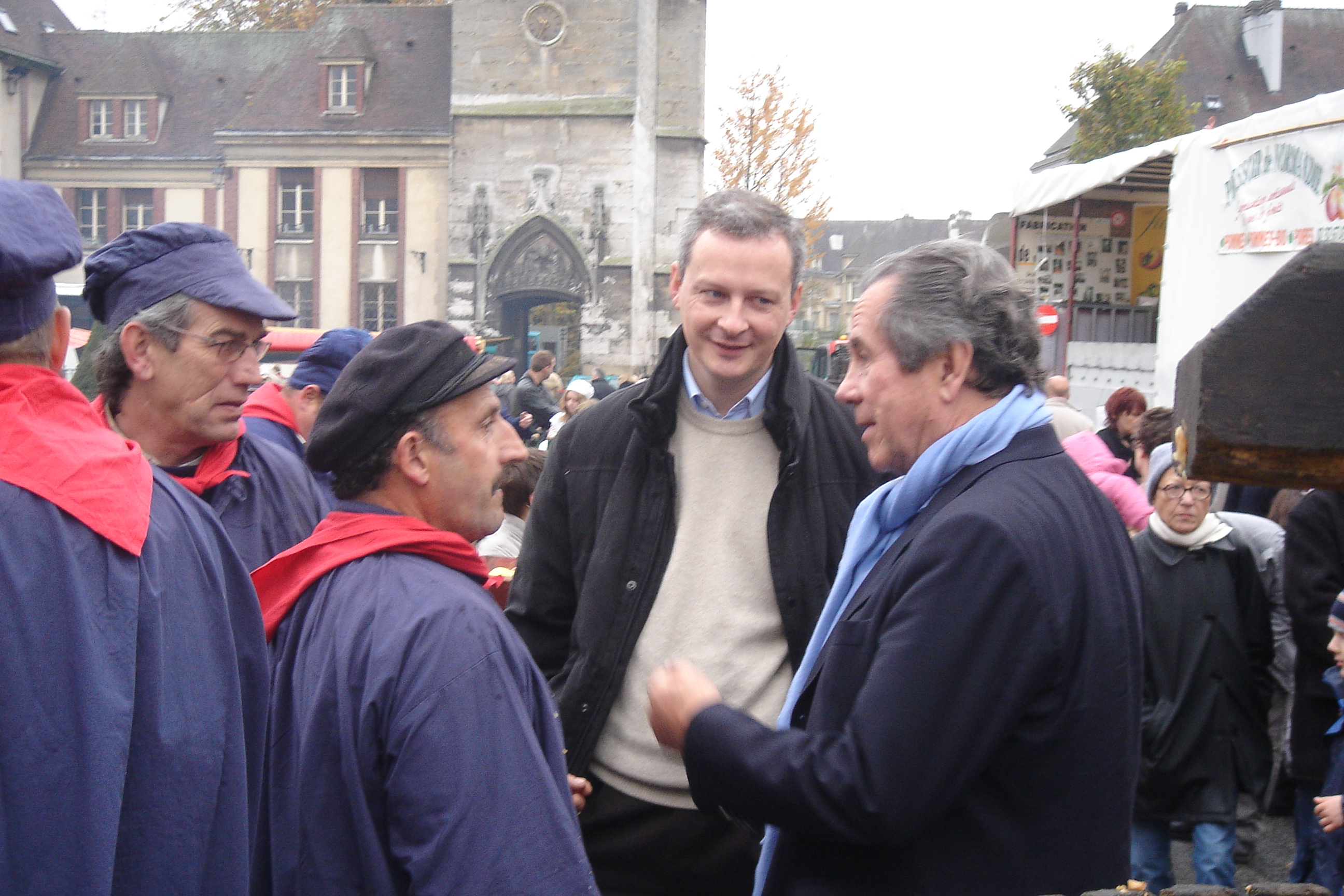 BLM et Jean-Louis Debré - Evreux - Fête de la pomme - 03/11/2007